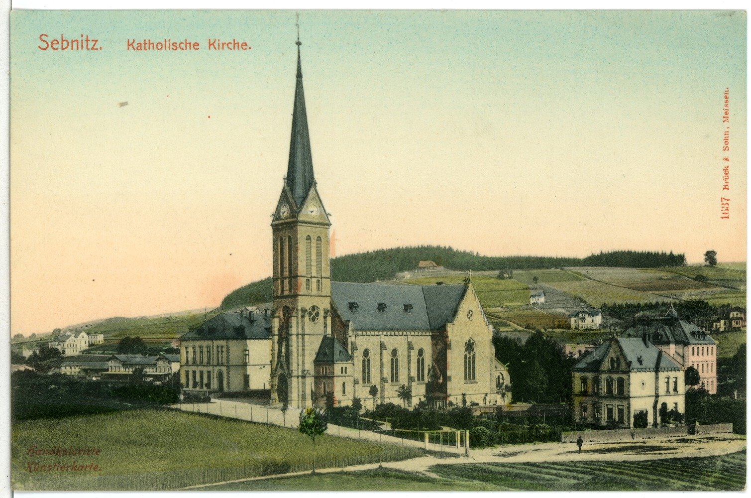 Sebnitz; Katholische Kirche This postcard is from publisher Brück & Sohn in Meißen ( This postcard has a unique number 01637 and is available in a higher resolution at the publisher. This images was uploaded in a cooperation project between Wikipedians and the publisher.